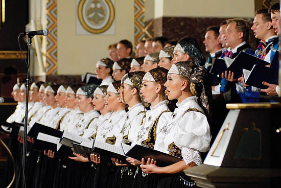 Wielka msza żałobna Francois Joseph Gosseca w wykonaniu Zespołu Pieśni i Tańca Śląsk w Mikołowie